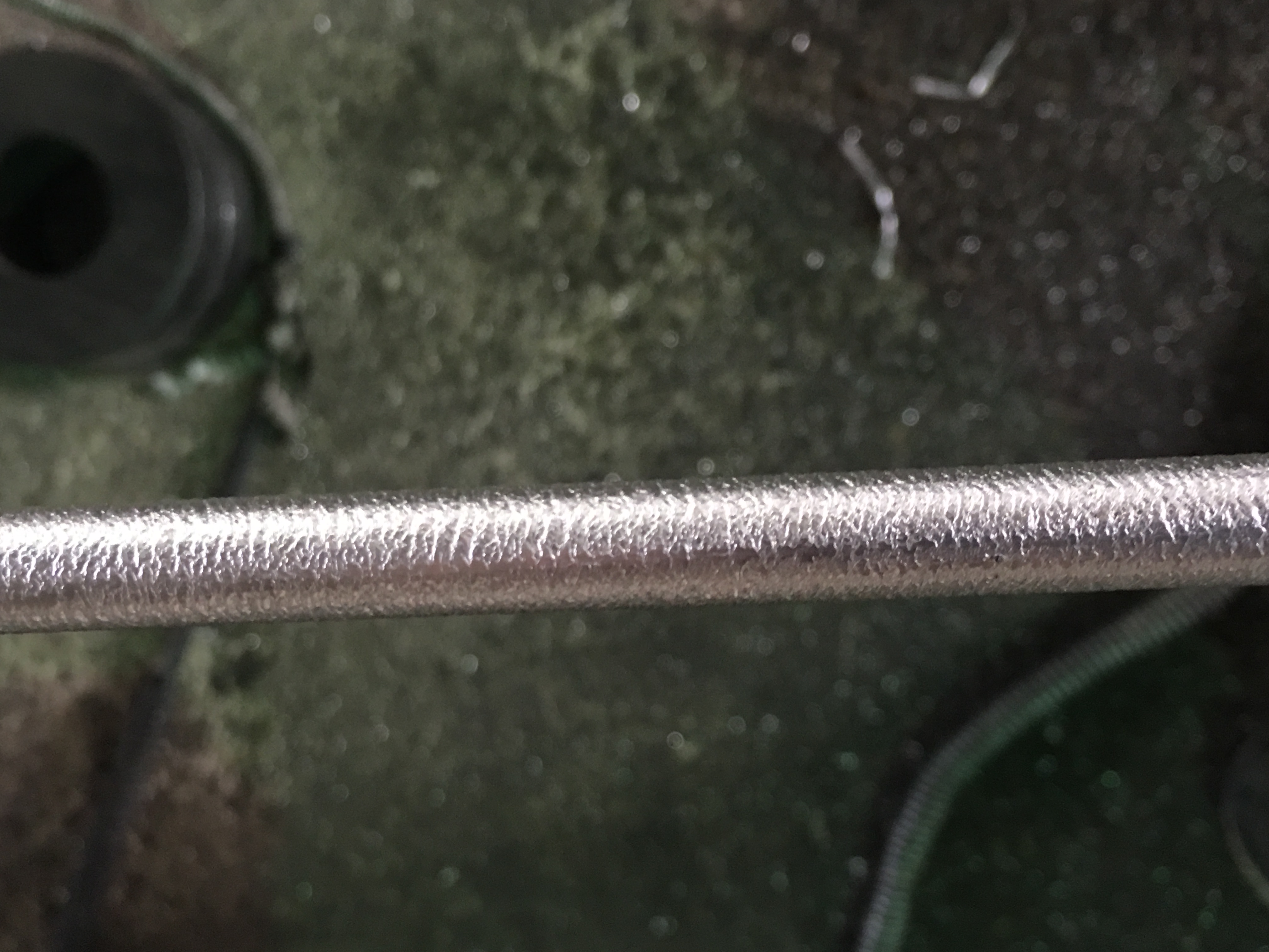 الگوهای جریان روی محصول اکسترود شده که یک عیب اکستروژنی است